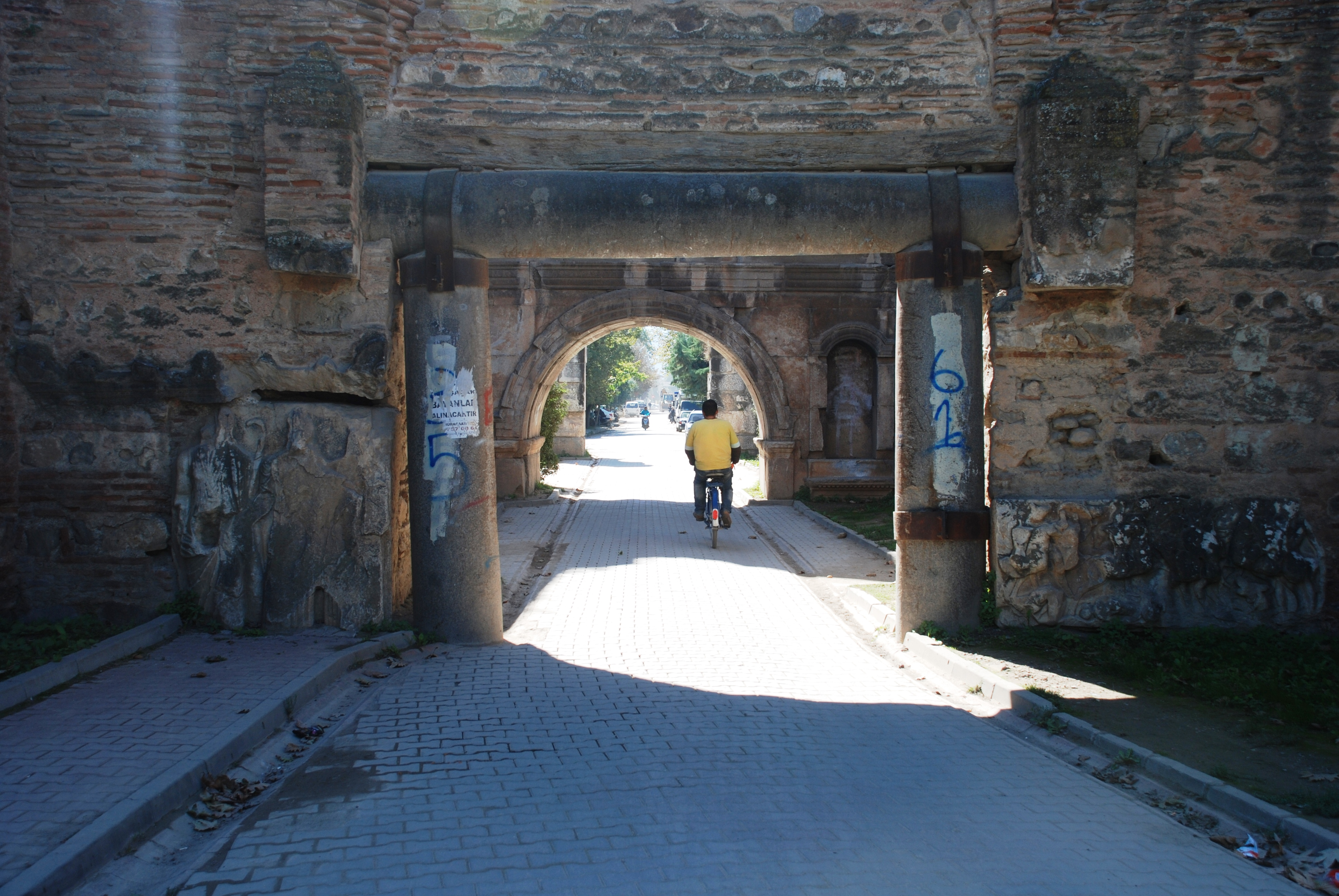 İznik surları